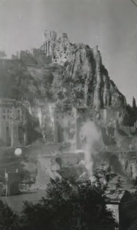 Les ruines de la citadelle et de la ville de Sisteron après le bombardement allié du 15 août 1944. Sud de la France.